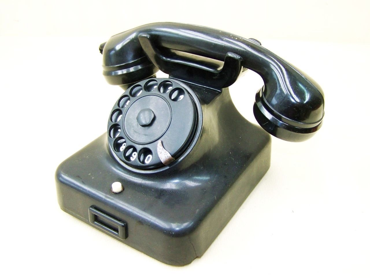 Tischfernsprecher W38 - DDR-Ausführung